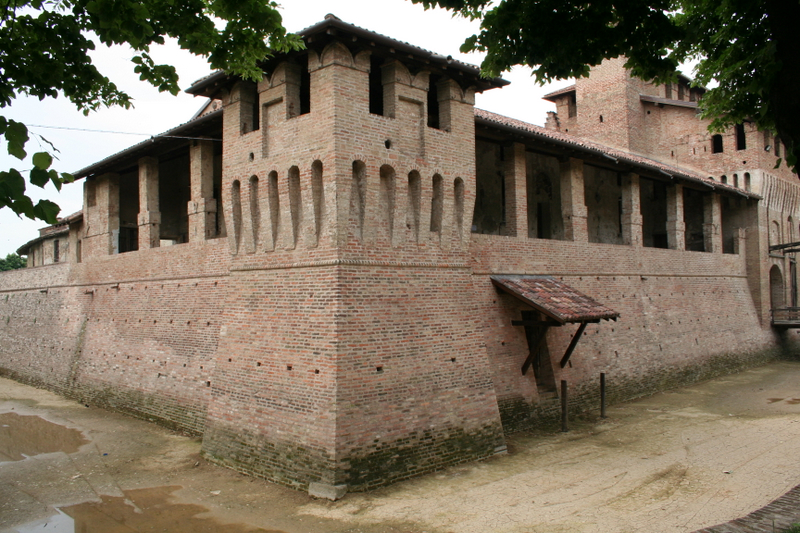 Pagazzano BG, Castello Visconteo.